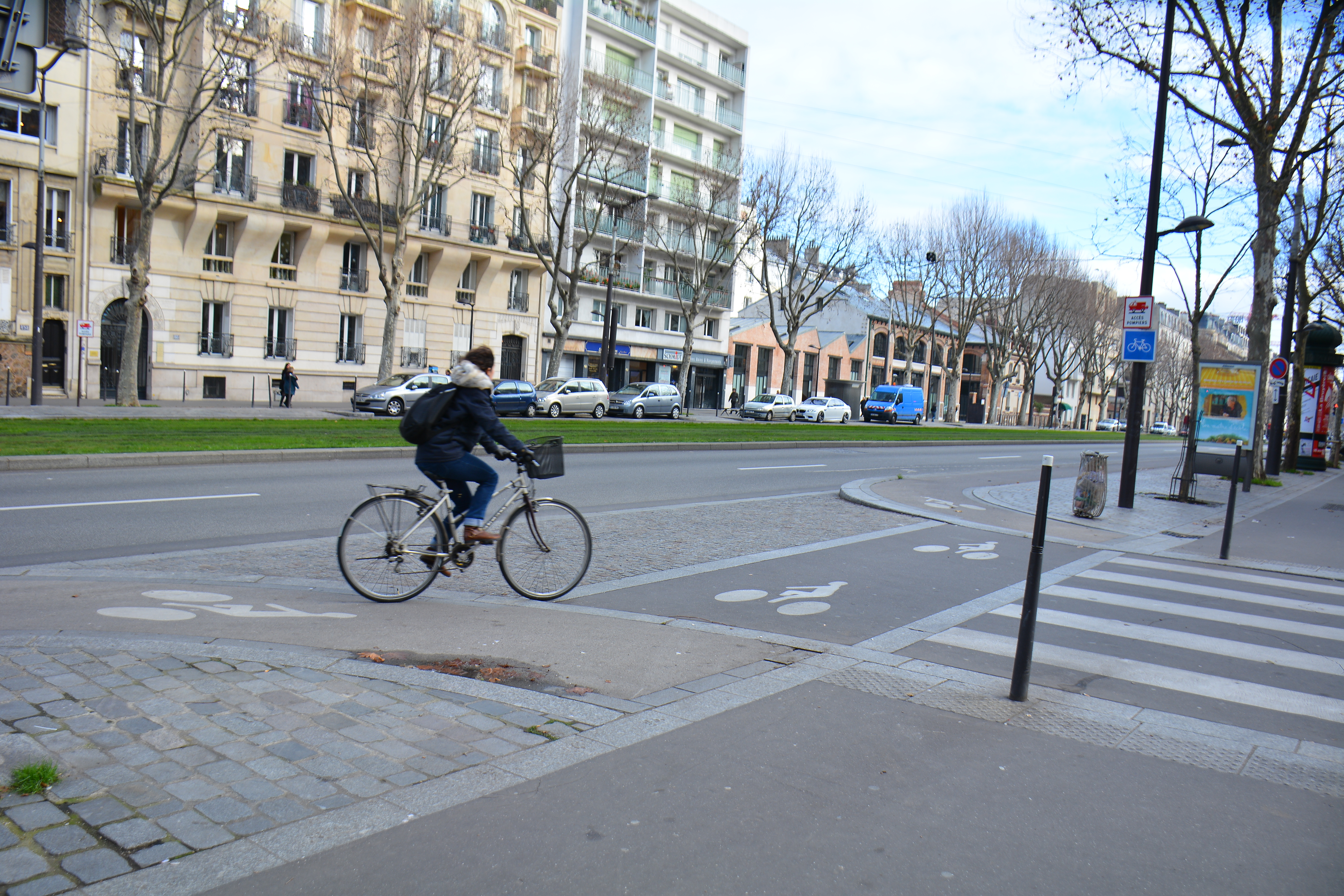 Exemple de traitement de piste cyclable aux intersections, sur le boulevard Brune, à Paris.